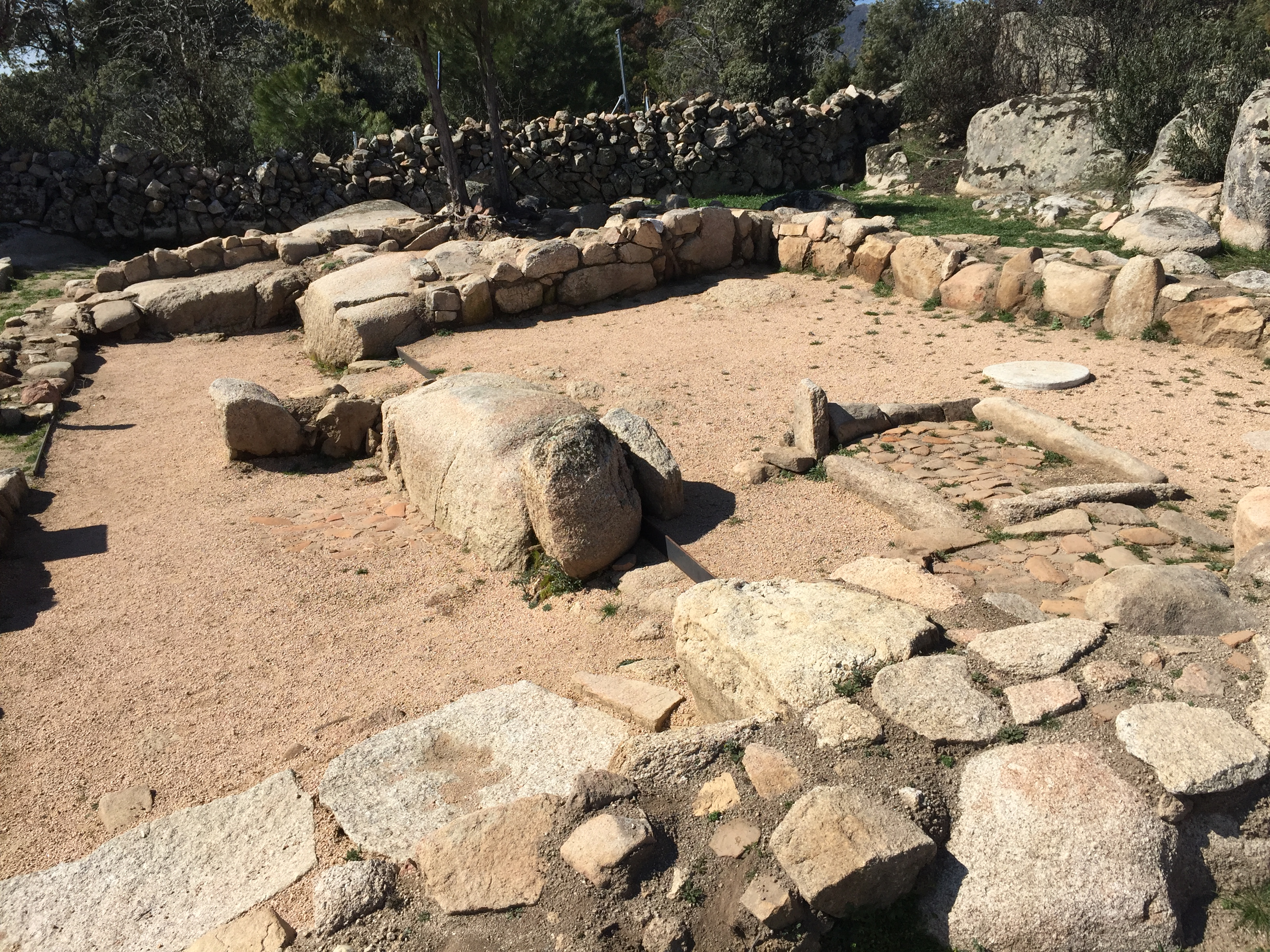 Yacimiento arqueológico de la Cabilda (s. VII-XIII). Hoyo de Manzanares, Madrid (España)